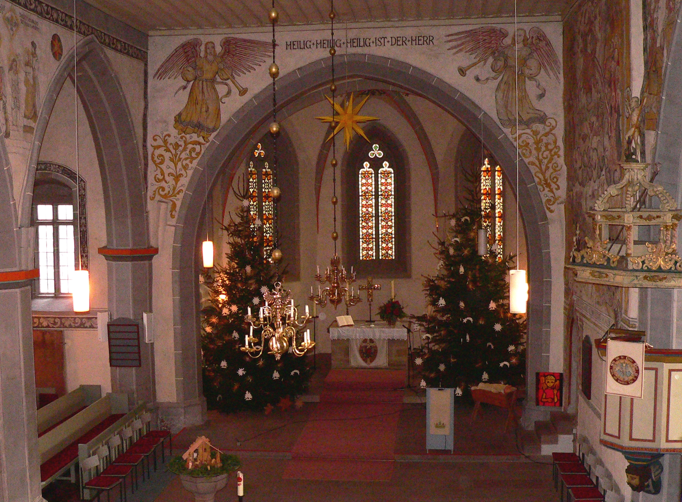 Evangelische Kirche St. Laurentius in Dassel, Niedersachsen, Deutschland - Altarraum